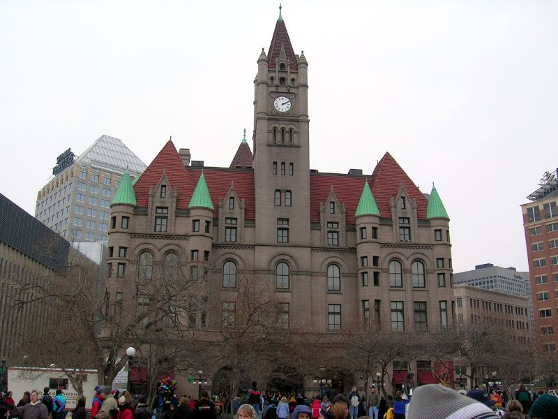 John Pouchak, Flickr